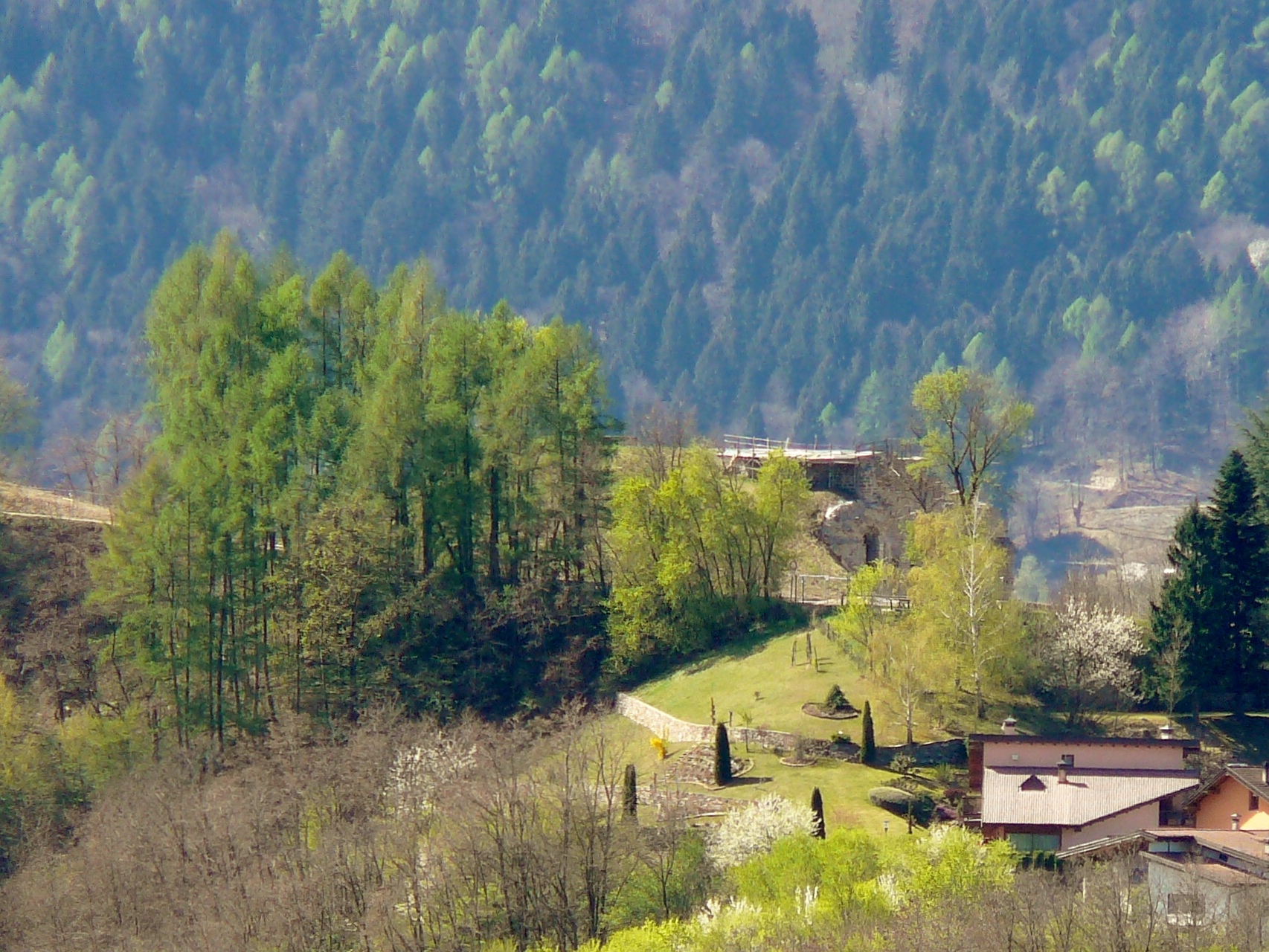 Forte Tenna dal Forte Col delle Benne